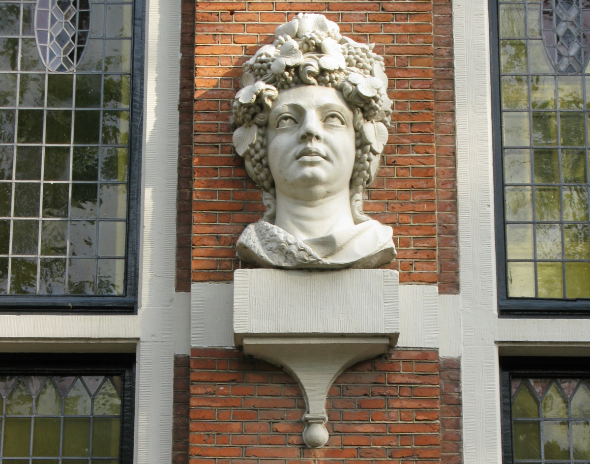 amsterdam, keizersgracht 123